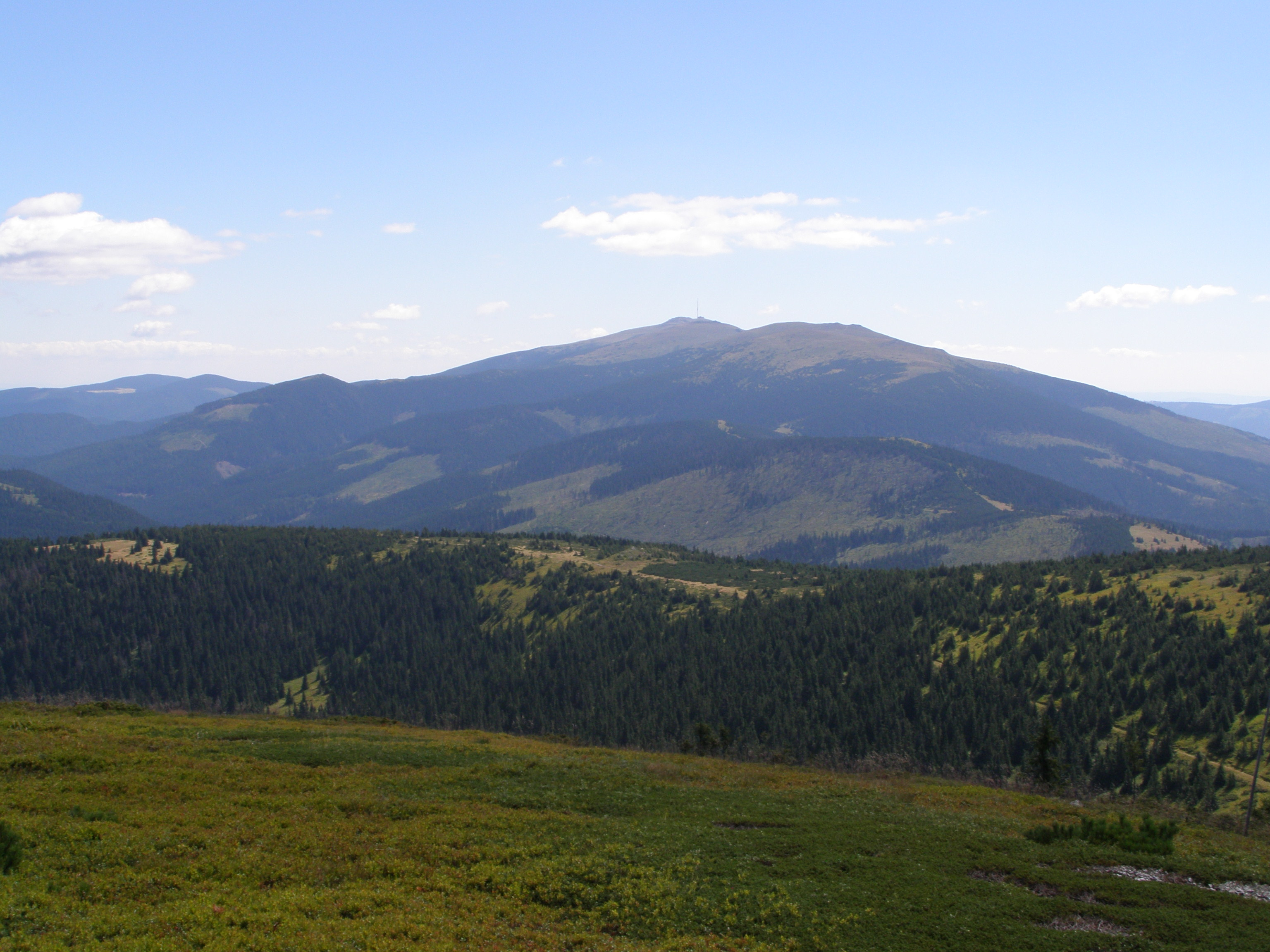 Nízké Tatry, Kráľovohoľské Tatry, pohled z vrcholu Veľká Vápenica (1691 m) na východ: v popředí cesta vedoucí ze sedla Priehybka, za ní vrchol Andrejcová (1520 m), vzadu napravo splývající vrcholy Bartková (1790 m) a Orlová (1840 m), vzadu nalevo splývající vrcholy Stredná hoľa (1876 m), Kráľova hoľa (1946 m)